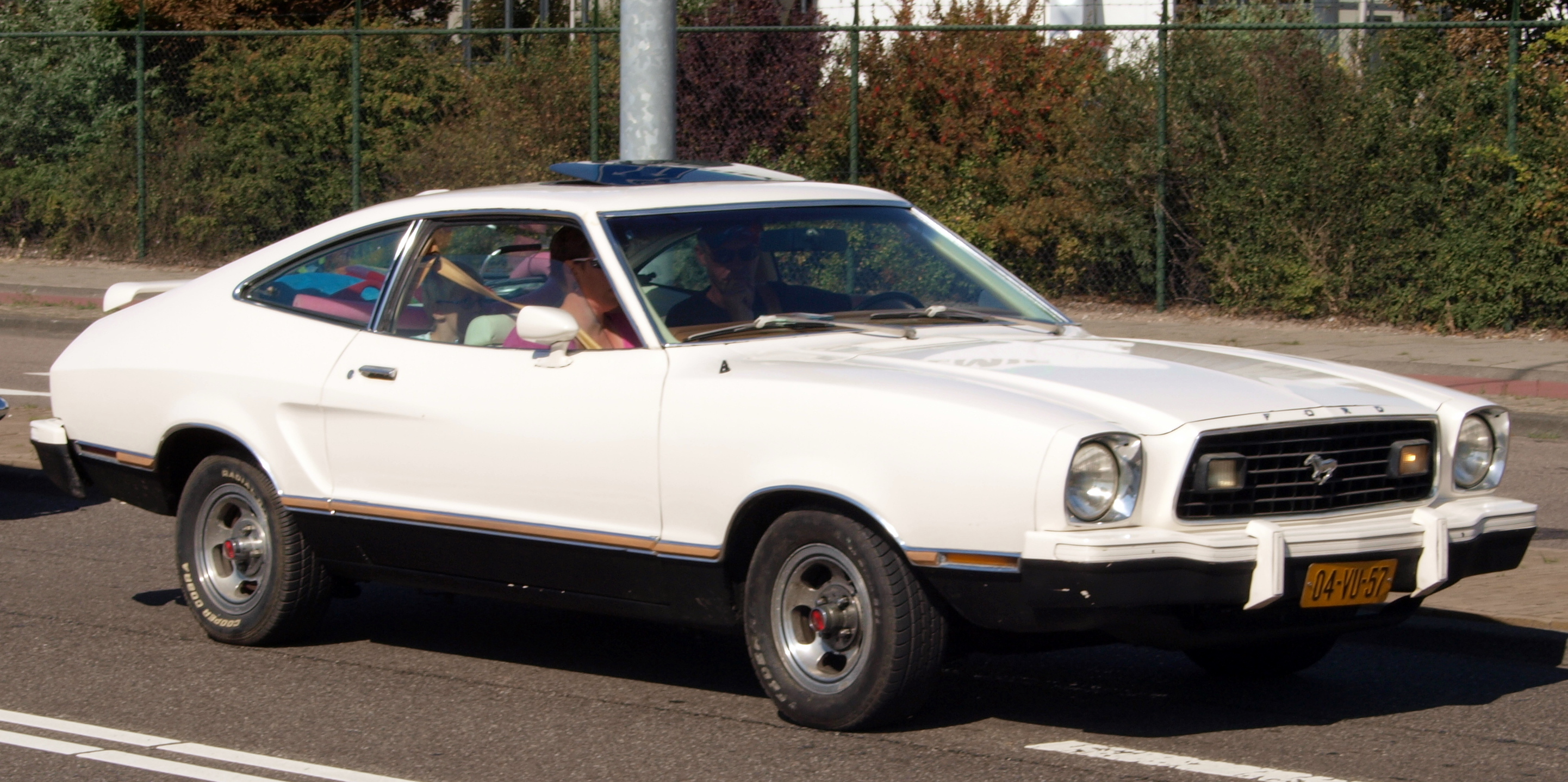 Ford Mustang II 2+2 04-VU-57